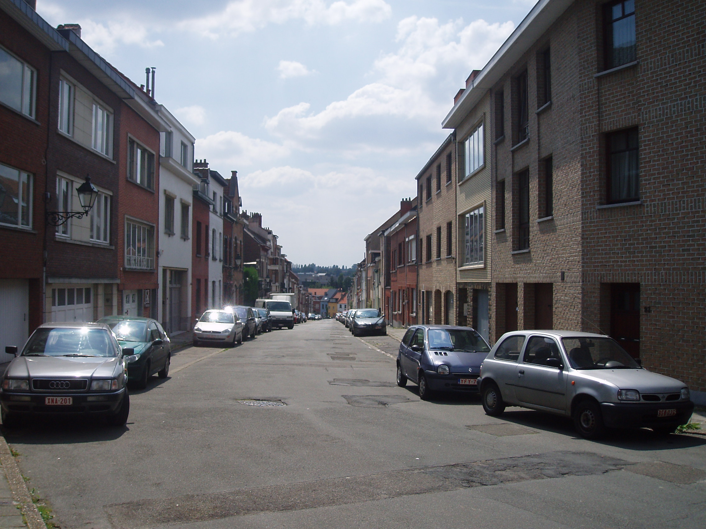 avenue Walckiers Auderghem Belgium